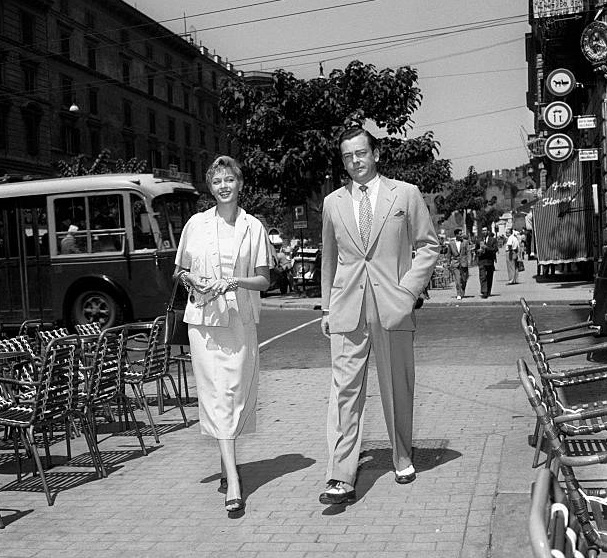 Isa Barzizza e il marito Carlo Alberto Chiesa in via Veneto a Roma